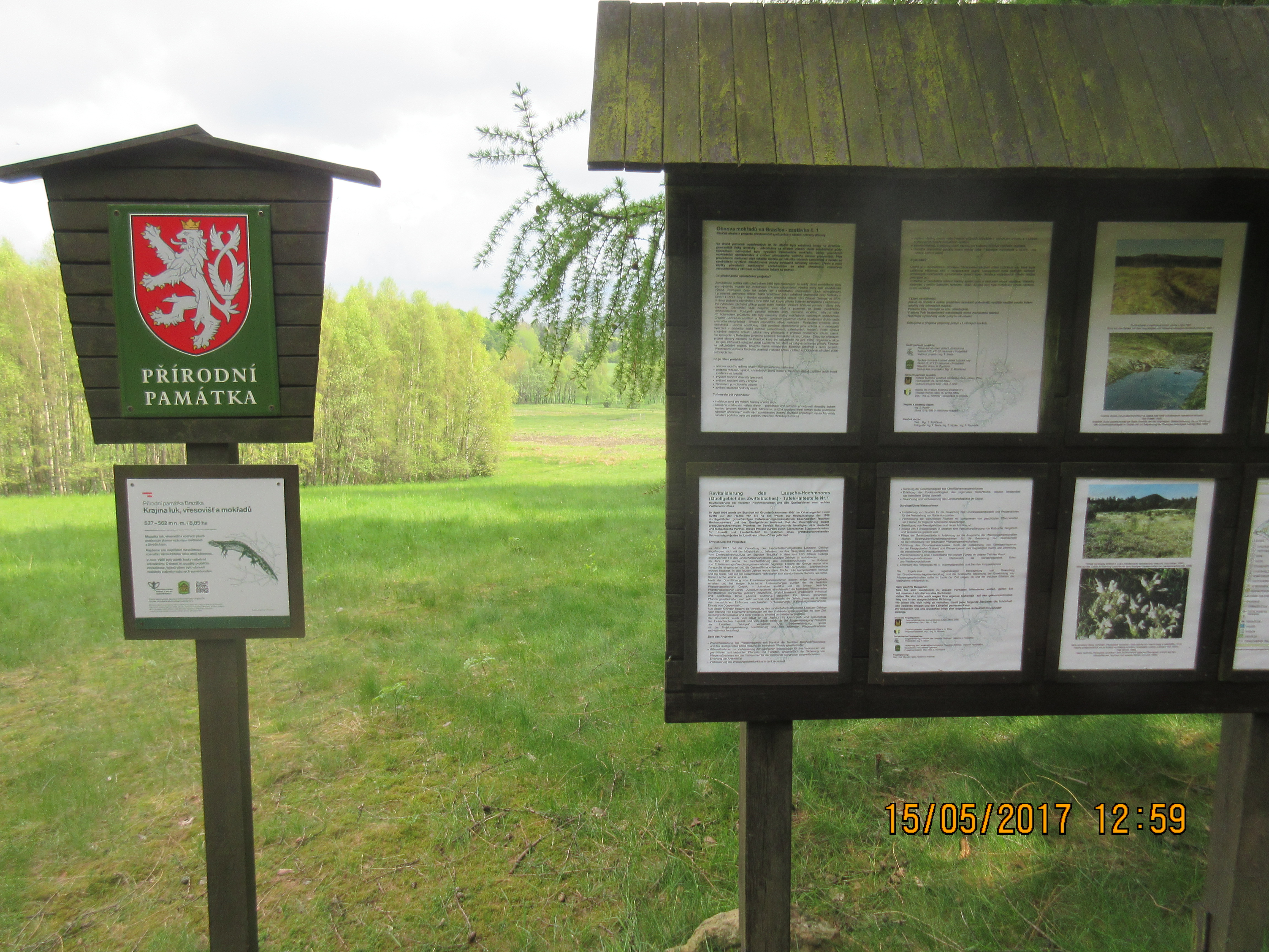 Tabule na horním okraji přírodní památky